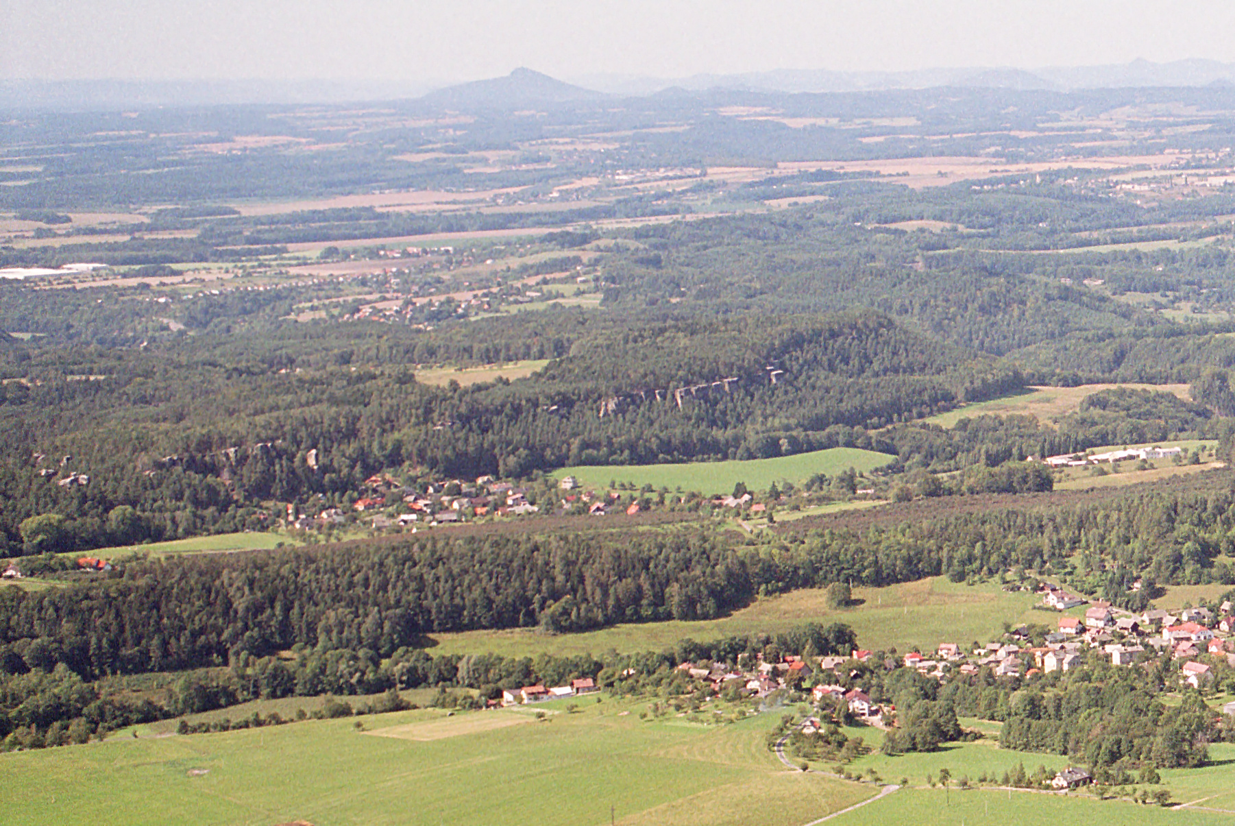 Klokočské skály in the Bohemian Paradise Geopark (Český ráj), seen from the mountain Kozákov